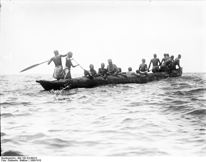 Einbaum auf dem Njassasee